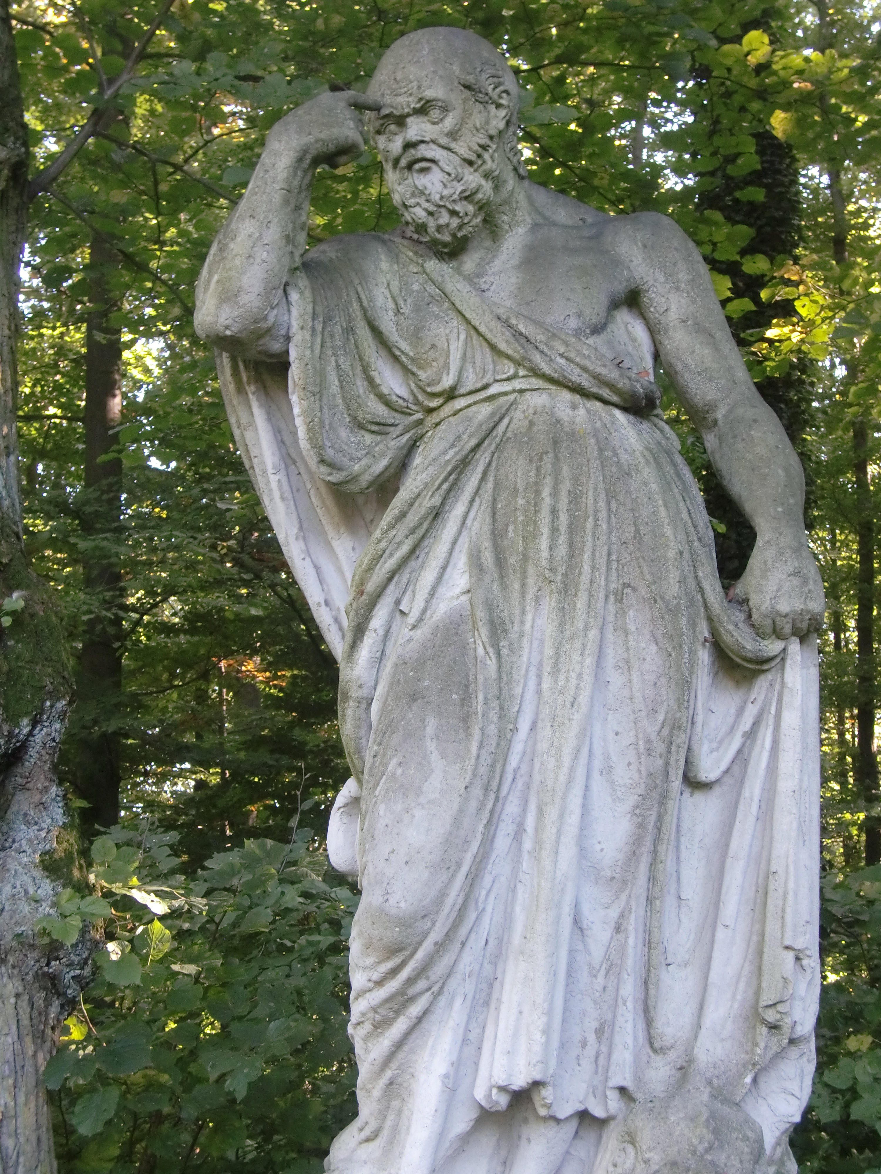 Sokratesstatue in der Eremitage Bayreuth, nach einem von der Italienreise mitgebrachten antiken Sokrateskopf gearbeitet vom Hofbildhauer Johann Schnegg